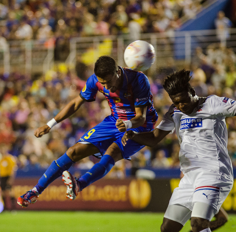 Ángel remata de cap en un Llevant-Helsingborgs.